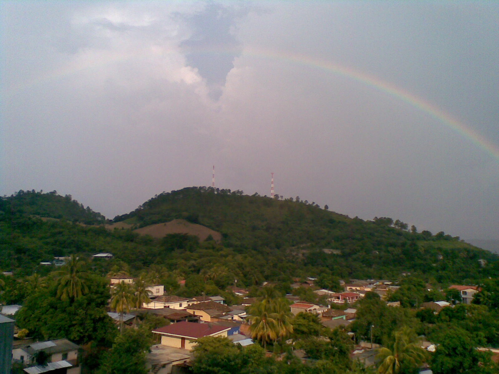 Hermosa vista de Arada,desde casa Leiva Quiroz